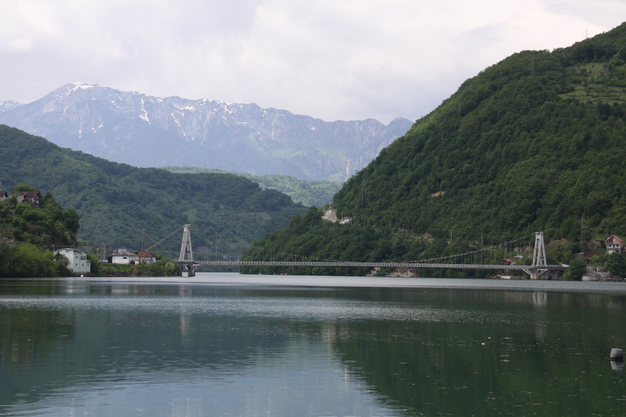 Viseći most Ostrožac